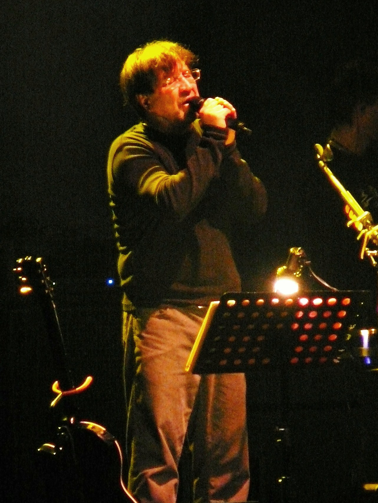 Шевчук Юрий Юлианович - на концерте группы "ДДТ" "Иначе" (г. Казань, 16 декабря 2011 г.).